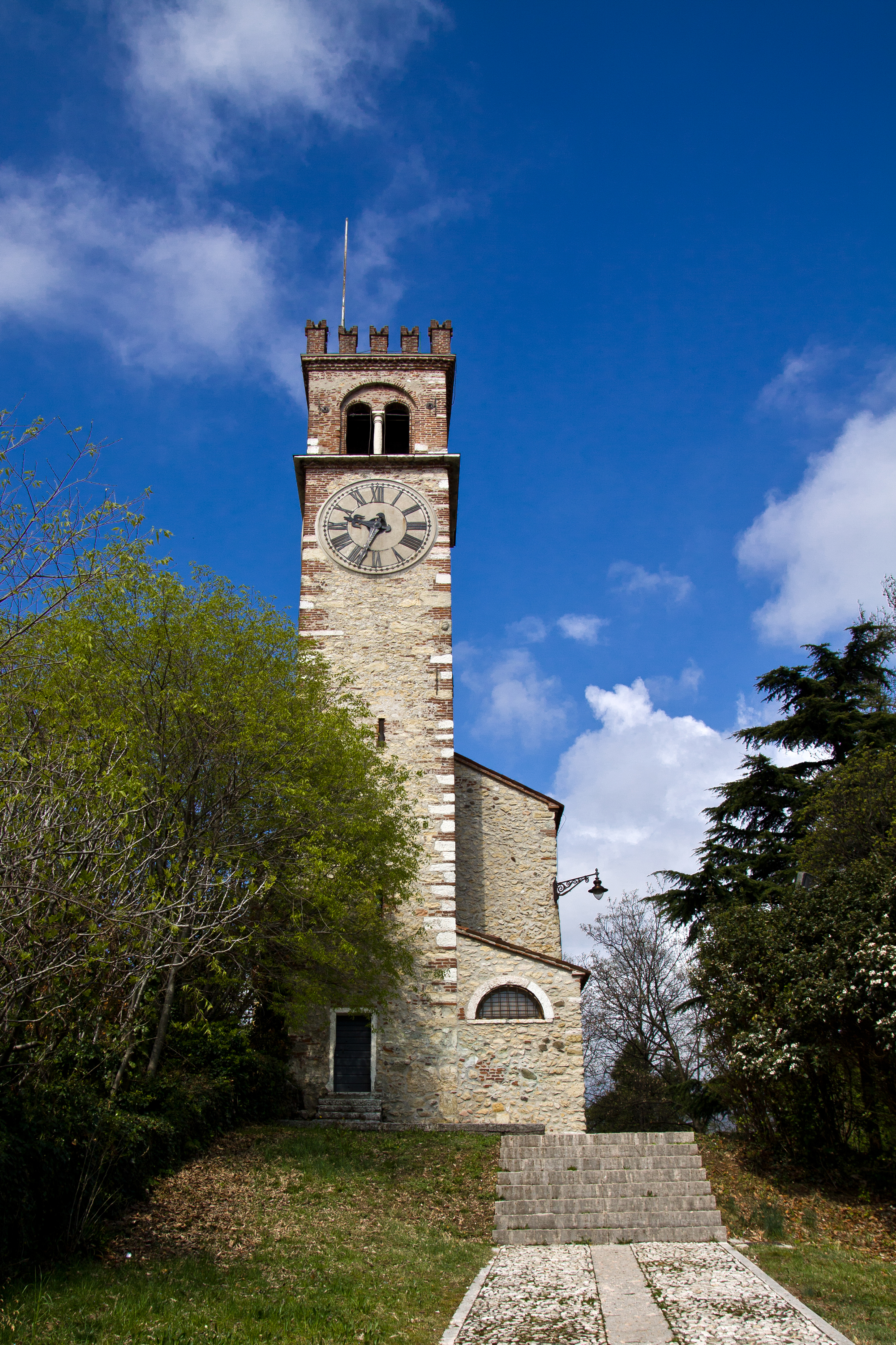 ex Chiesa di Santa Maria della Neve (altrimenti detta “Castello”), Tajara e scalette che salgono alla collina This is a photo of a monument which is part of cultural heritage of Italy.